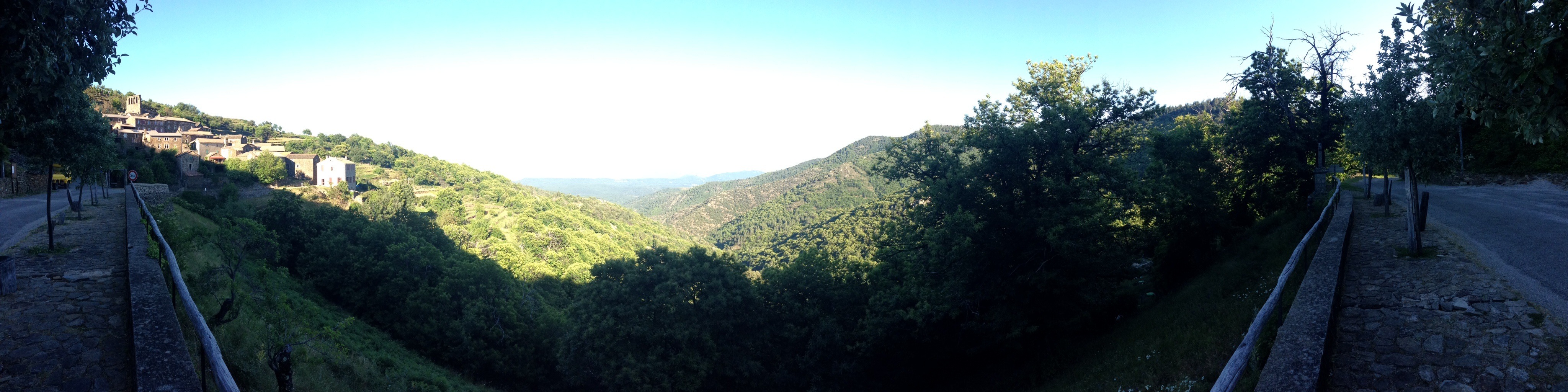 Panorama de Bonnevaux (30450), Gard, France